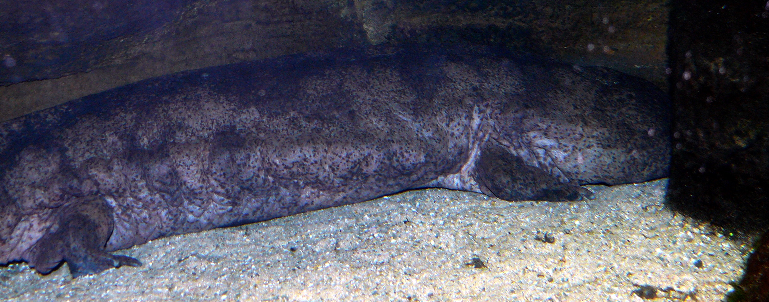 Chinesischer Riesensalamander (Andrias davidianus)